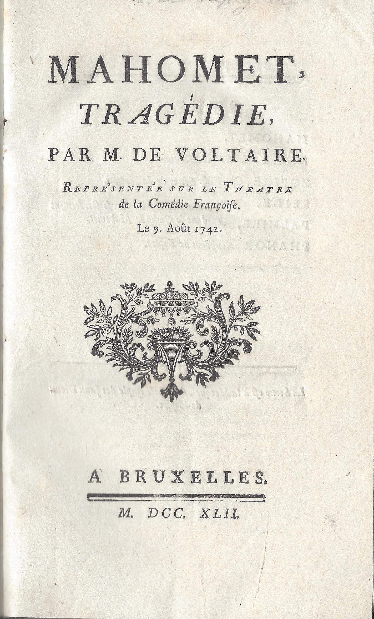 Titelseite der ersten Raubdruckausgabe des Mahomet von Voltaire, Brüssel 1742, 72. S.. Scan von einem eigenen Exemplar